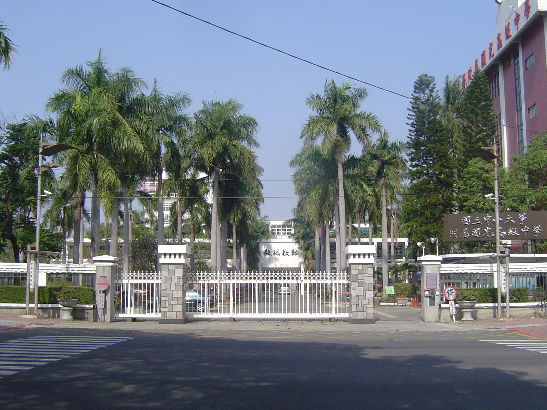 高雄市國立中山大學附屬國光高級中學校門。